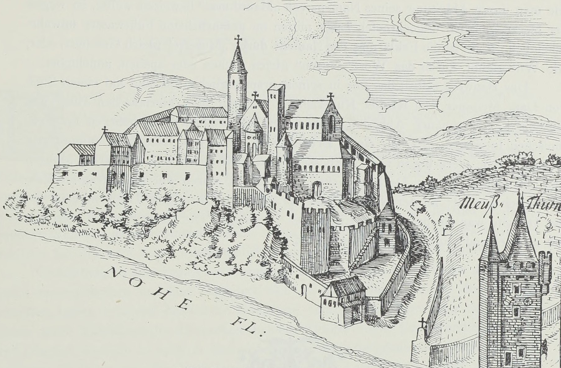 Mäusethurm mit Ruppertsberg nach Meisner 1638